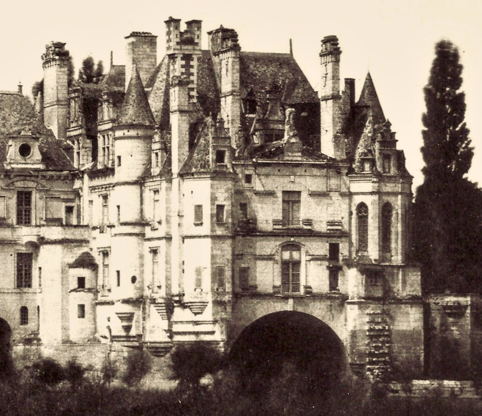 Château de Chenonceau, détail de la façade Est en 1851. Appartements de la reine Louise de Lorraine, avant leur destruction.